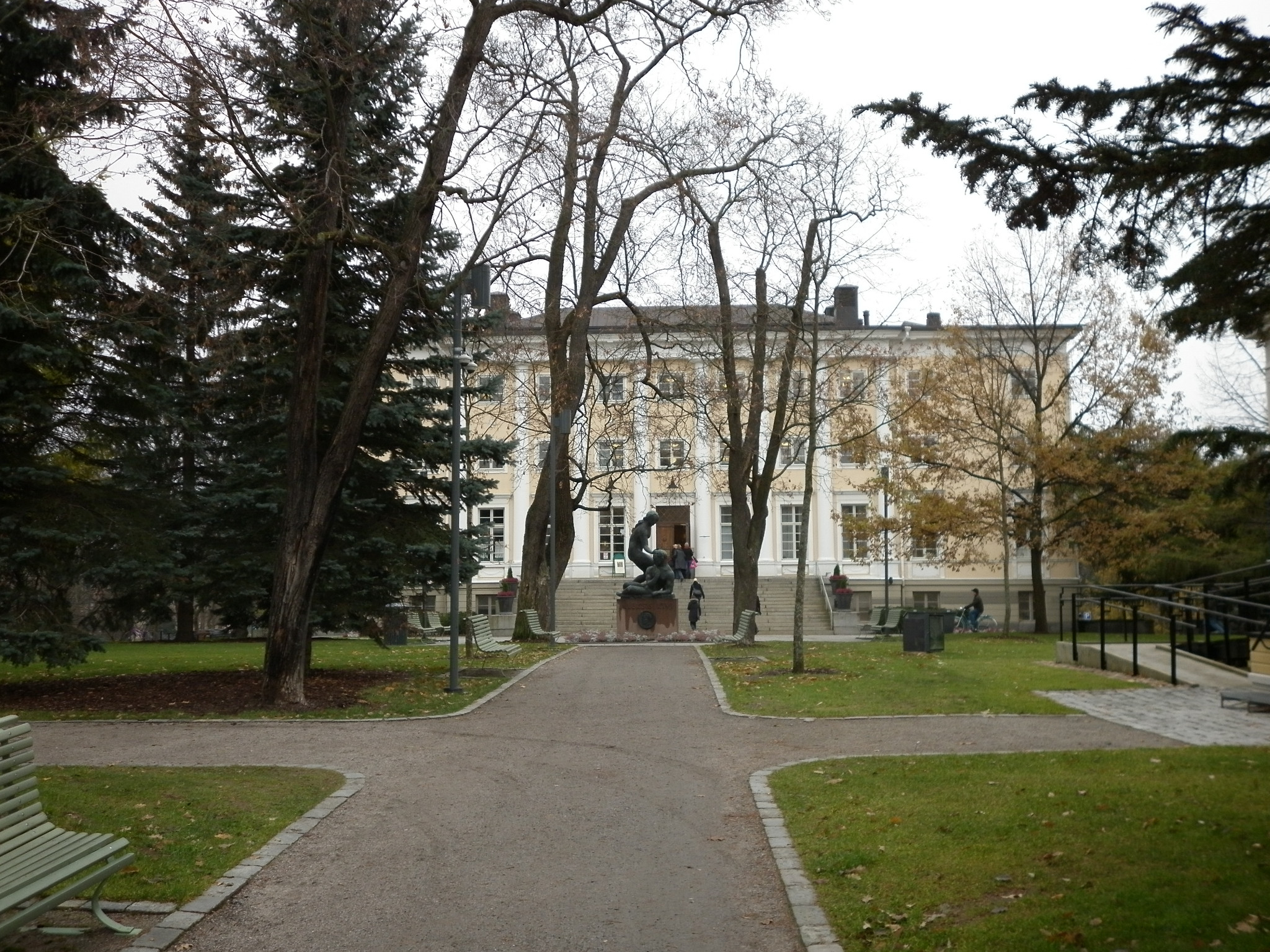 Vanha kirjasto puiden takaa